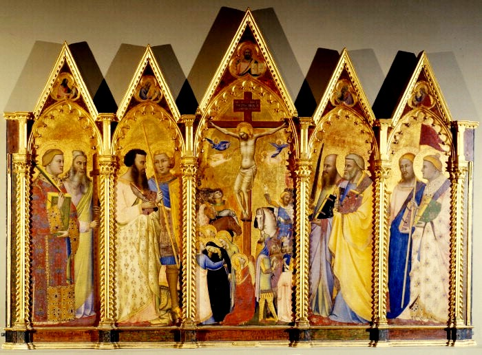 Bernardo_Daddi_1348._Courtaud.jpg